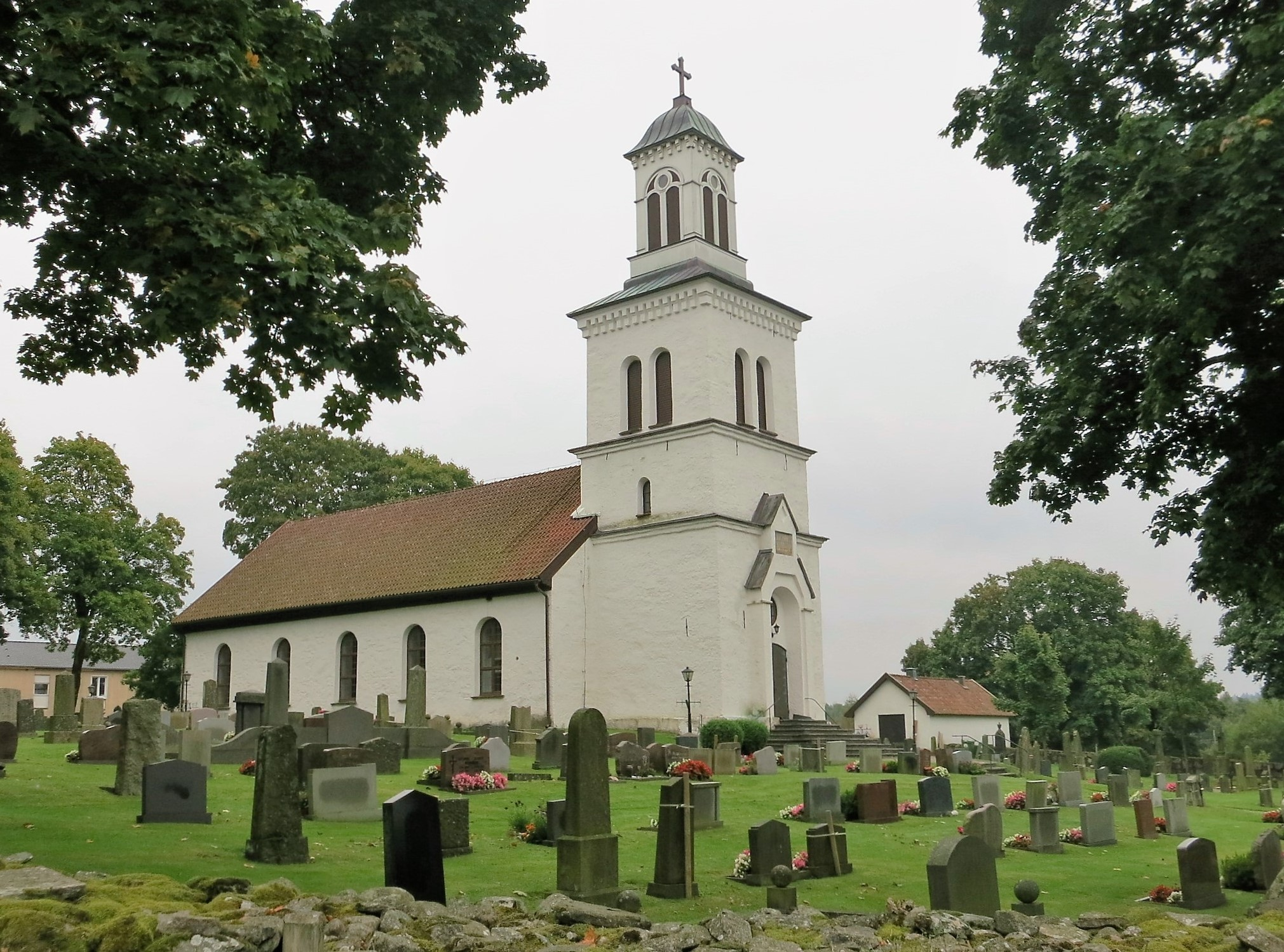 Gällareds kyrka i Halland